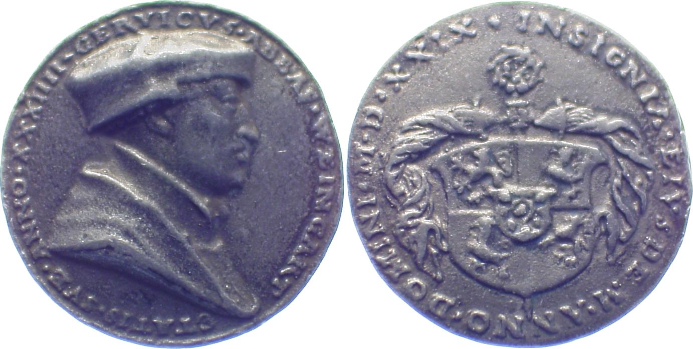 Gerwig Blarer, Abtei Weingarten; Blei-Medaille von Matthes Gebel, Nürnberg (1529)